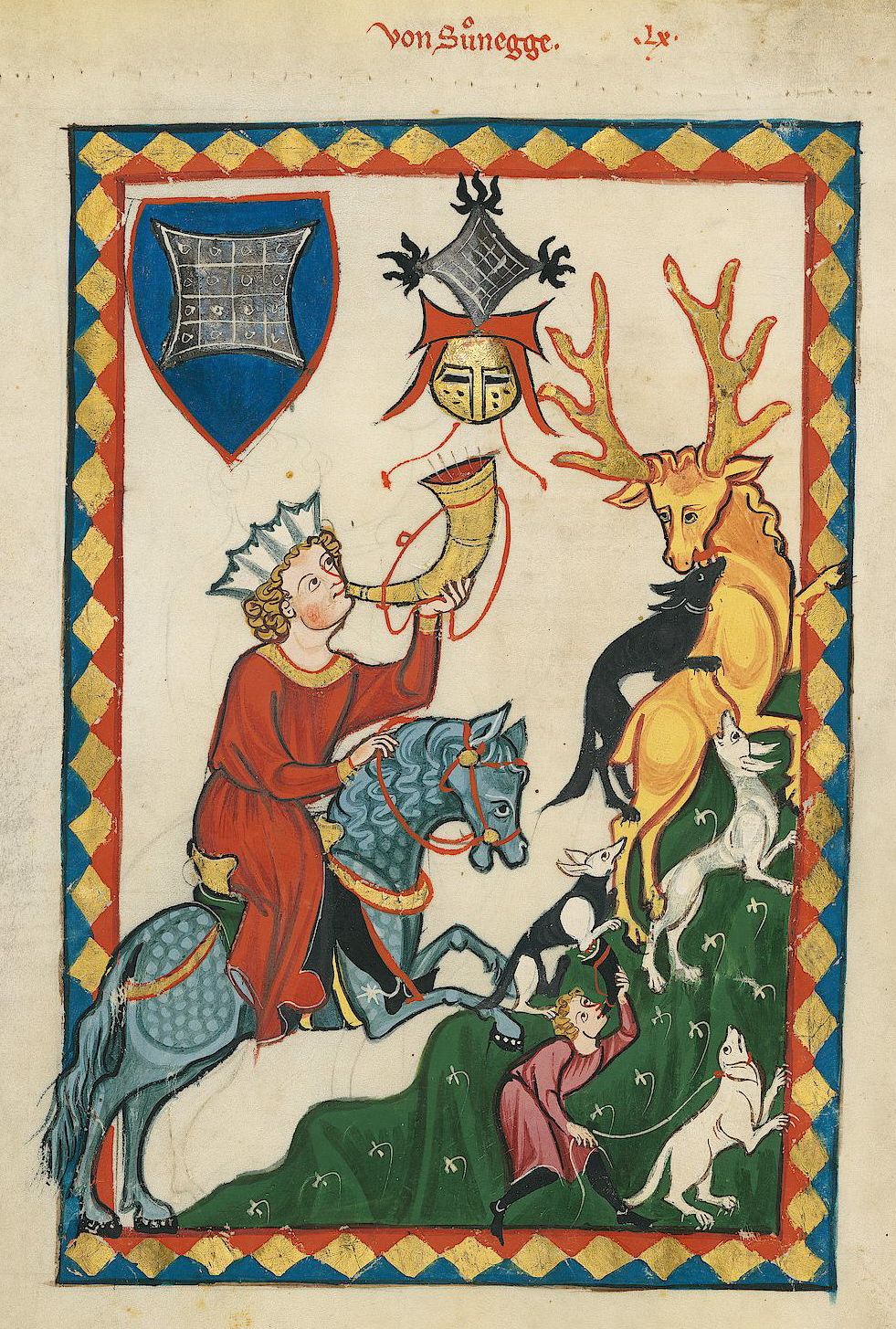 Codex Manesse, UB Heidelberg, Cod. Pal. germ. 848, fol. 202v: Der von Suonegg; vermutlich Konrad von Suonegge (bezeugt 1220-1241) aus der Familie der Freien von Suonegge, beheimatet in der Untersteiermark